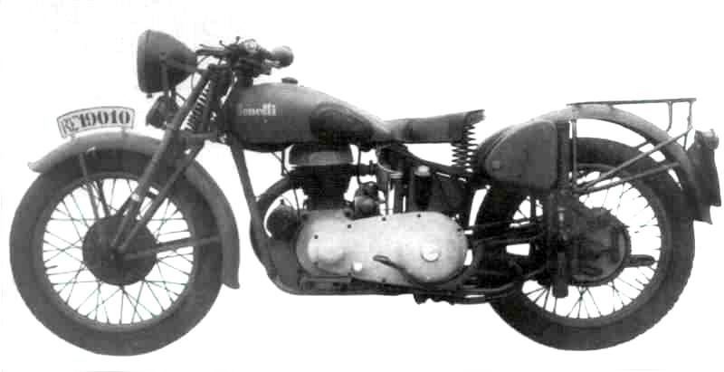 Benelli 500 VLM monoposto